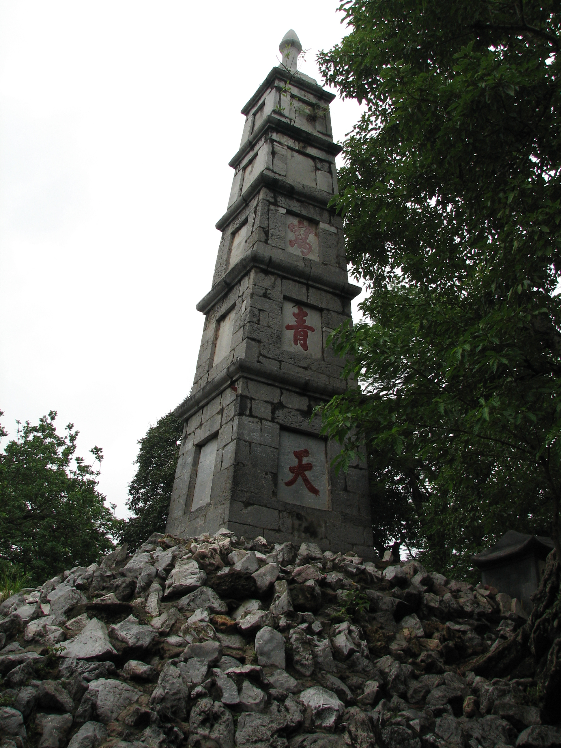 Tháp Bút nằm trước cửa Đền Ngọc Sơn. Hình do người truyền lên chụp tháng 8 năm 2007. This work has been released into the public domain by its author, Rungbachduong. This applies worldwide.In some countries this may not be legally possible; if so:Rungbachduong grants anyone the right to use this work for any purpose, without any conditions, unless such conditions are required by law.